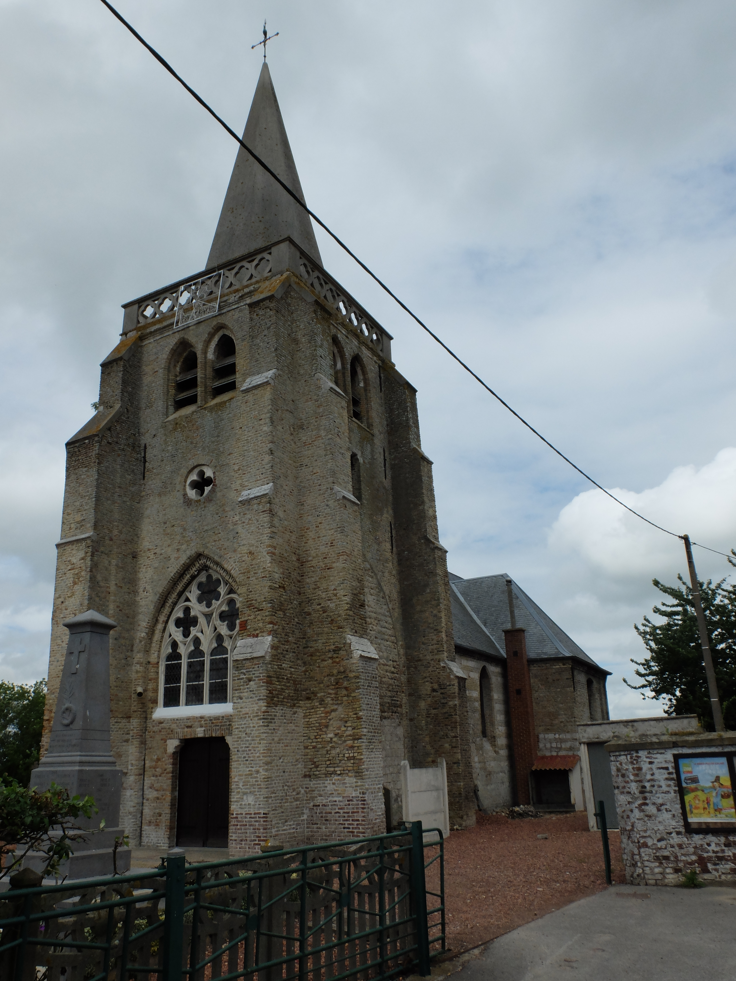 Vue de l'église Saint-Michel d'Holque. Le monument aux morts est également présent.